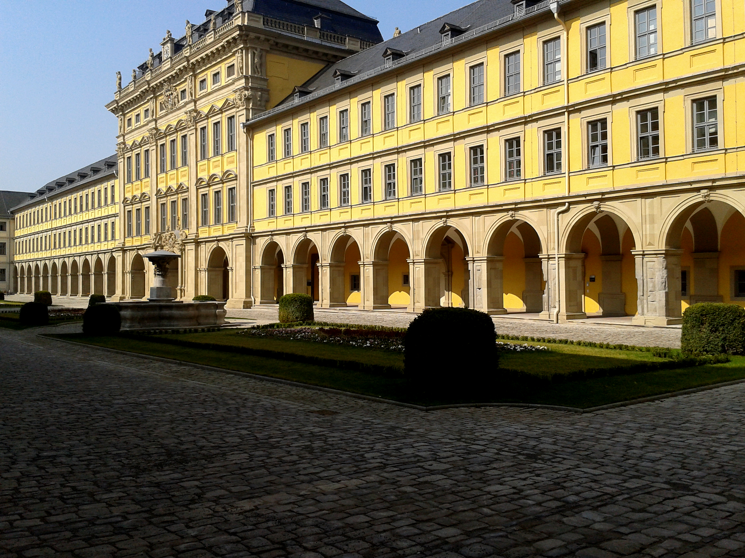 Arkadenbau Julius-Spital Würzburg.